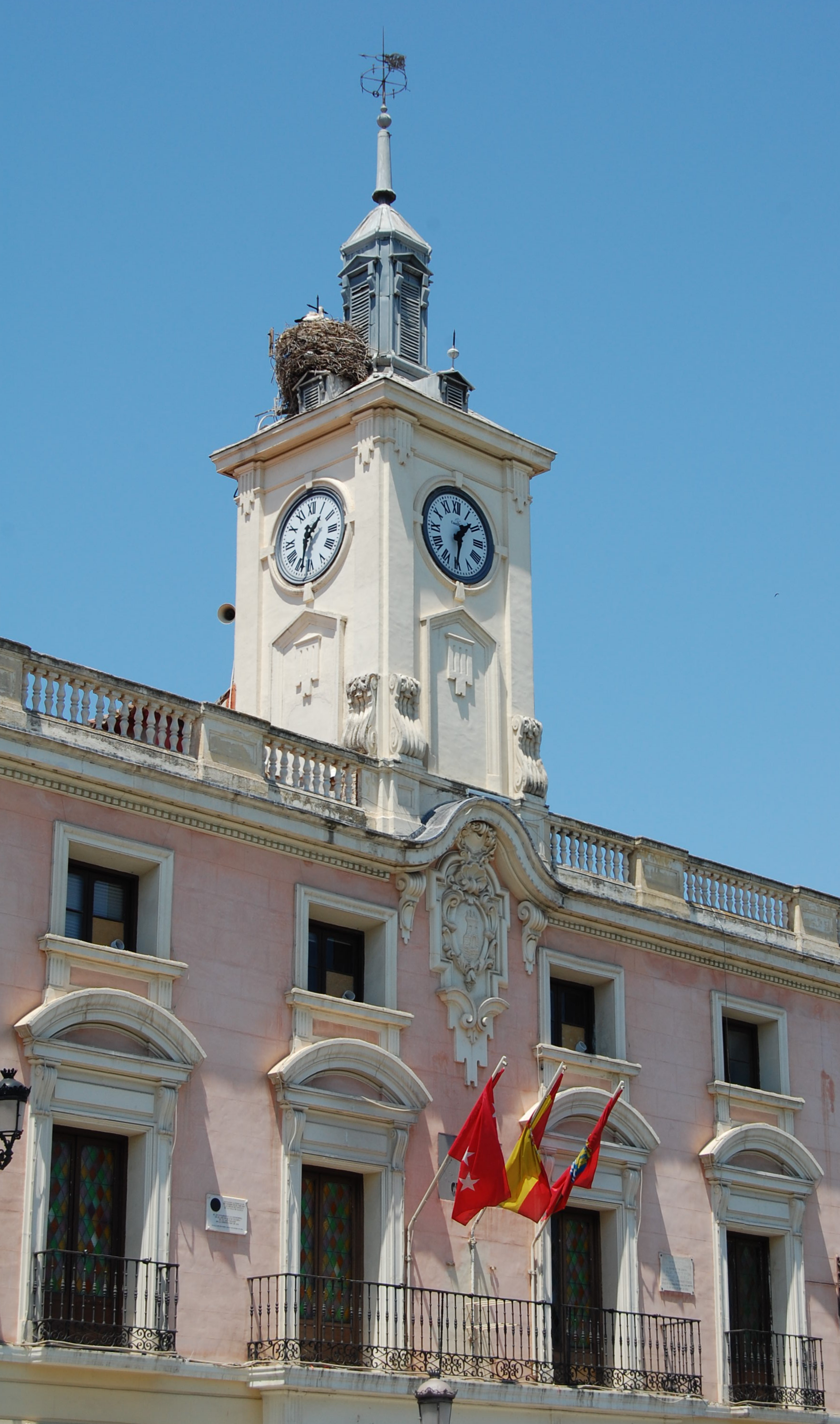 Torre de reloj y balcón principal del Ayuntamiento de Alcalá de Henares (Comunidad de Madrid - España). Resultado de la reforma de la fachada que realizó, en 1924, el arquitecto municipal José de Azpíroz.